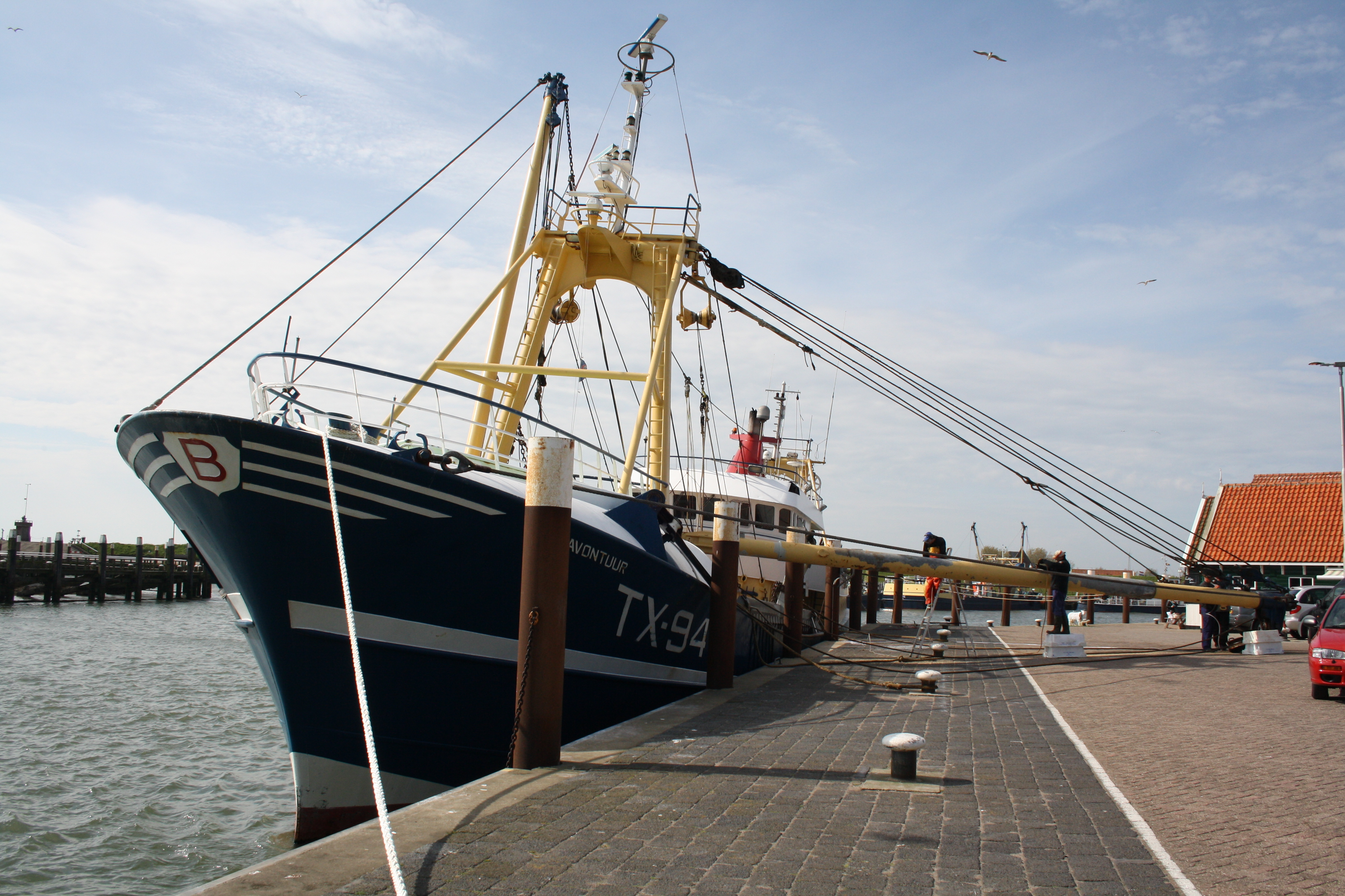 Texel- Oudeschild- TX 94